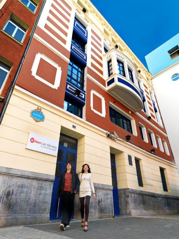 Oficinas y Centro de empresas en Bilbao La Vieja